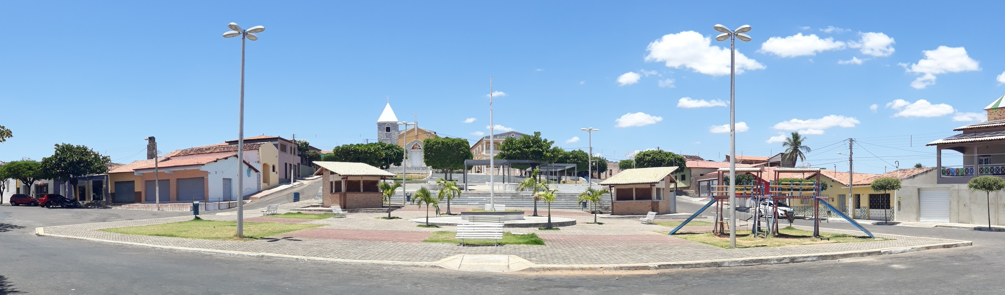 Português do Brasil: Praça da Matriz de Encanto, Rio Grande do Norte (Brasil), ao fundo a Igreja Matriz de São Sebastião e o Centro Pastoral Shalom.